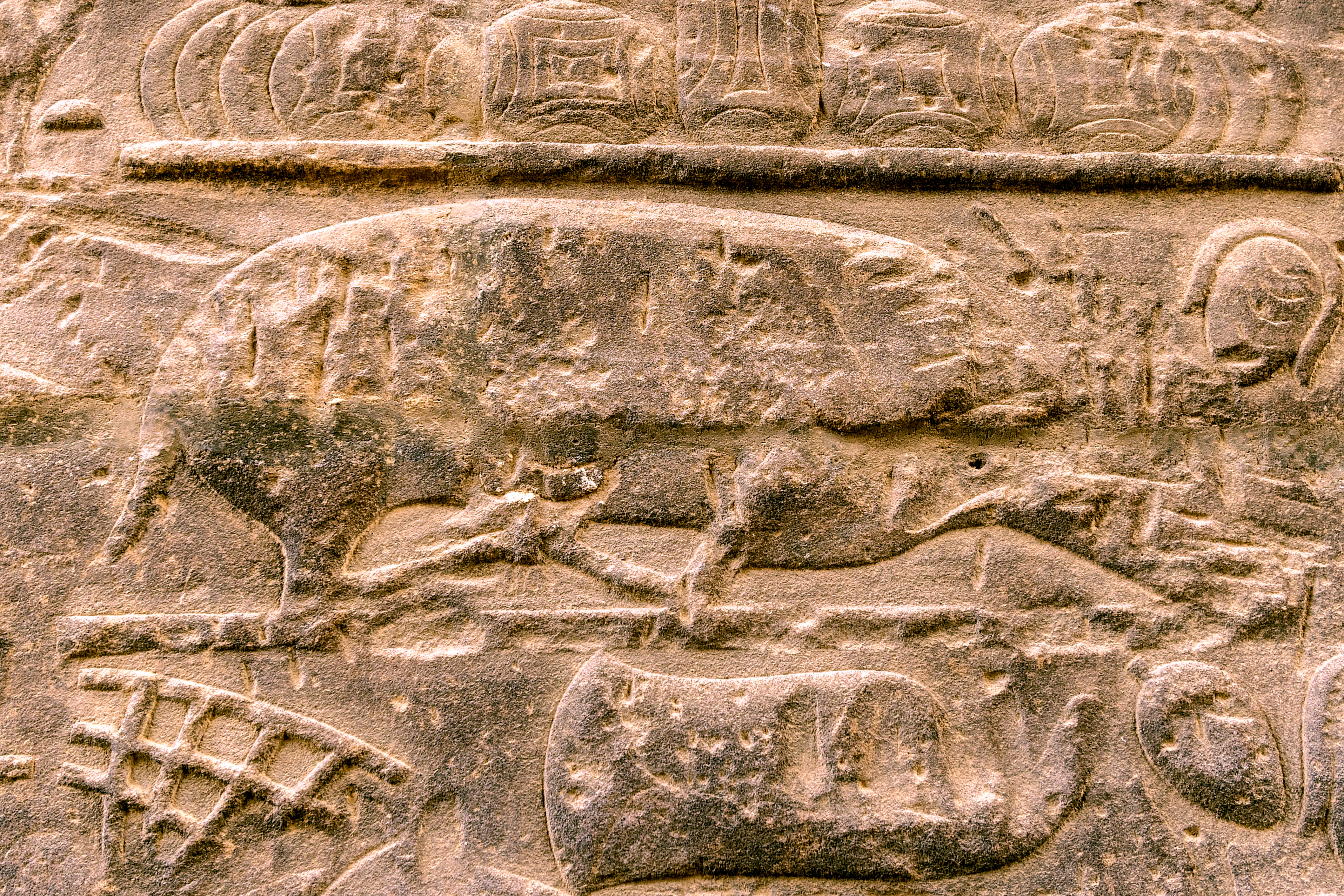 Reliefdarstellung eines Hausschweins im ersten Pylonen der Tempelanlage von Philae